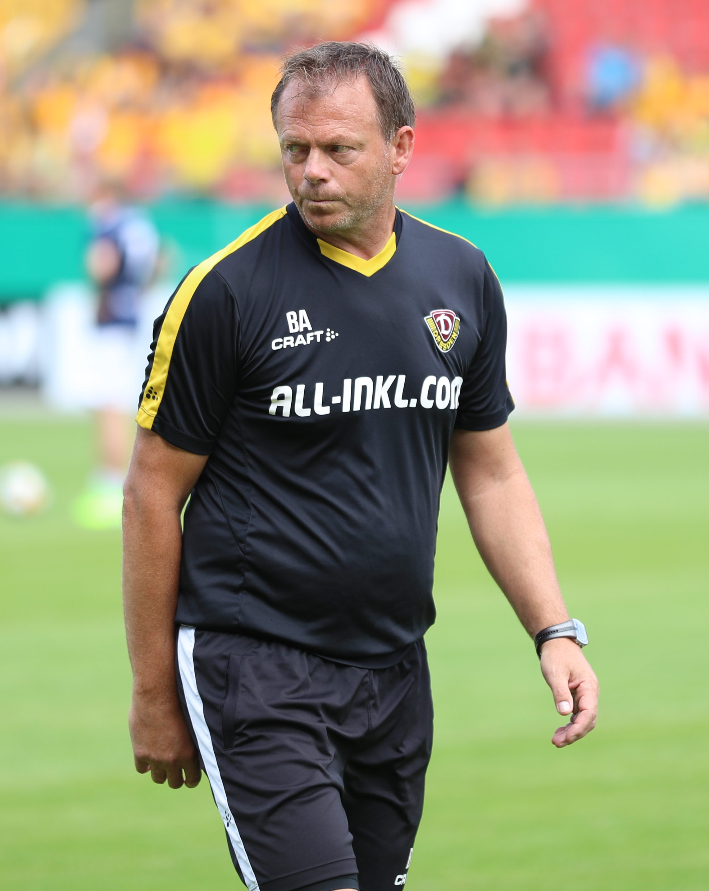 DFB-Pokal 2019/20, 1. Hauptrunde, TuS Dassendorf gegen SG Dynamo Dresden 0:3 (0:1)